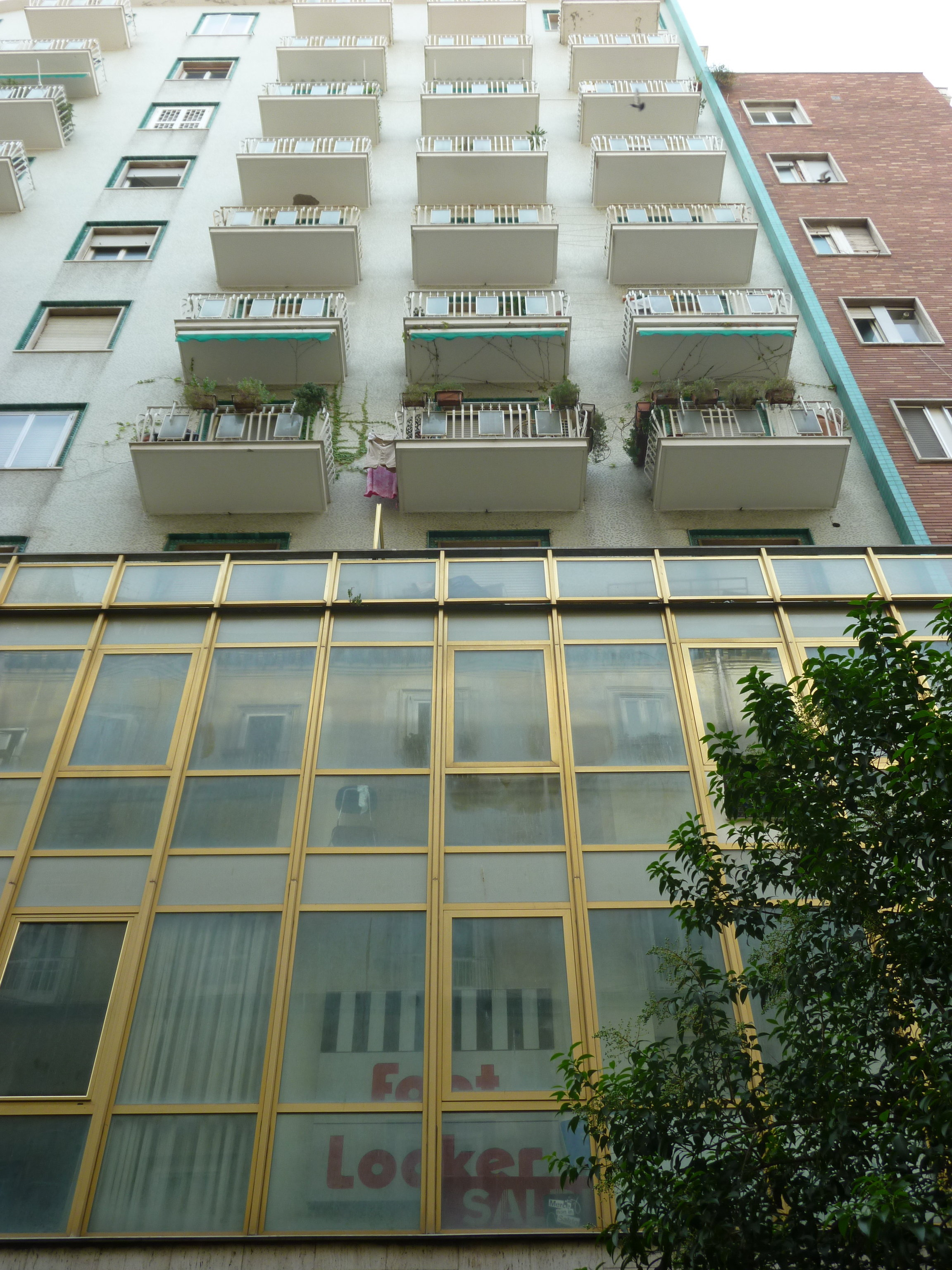 Napoli